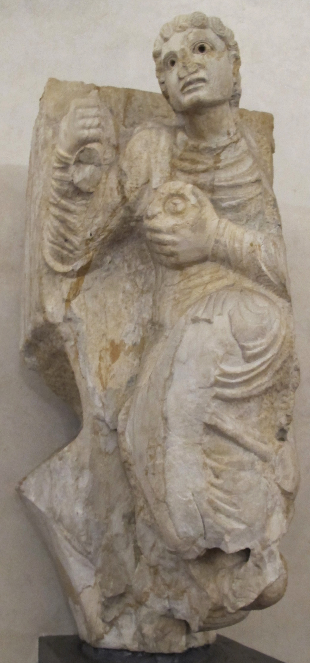 Biduino (attr.), arcangelo michele da timpano facciata duomo di pisa, XII sec